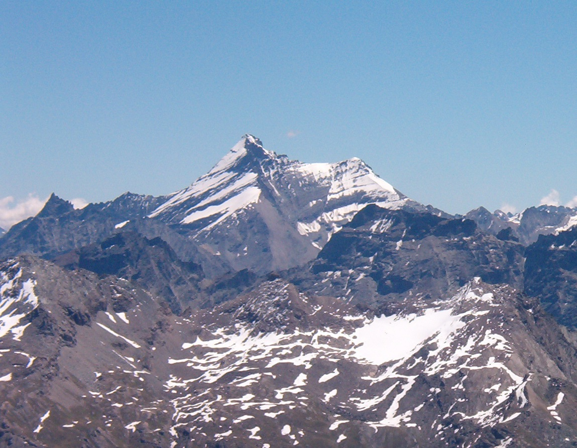 Monte Grivola - Valle d'Aosta - Italia